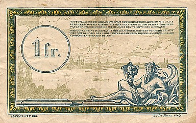 1 Franc Zahlschein (gültig bis 15. Dezember 1924) "Regiefranken"